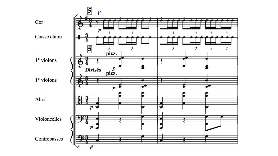 rythmes de boléro